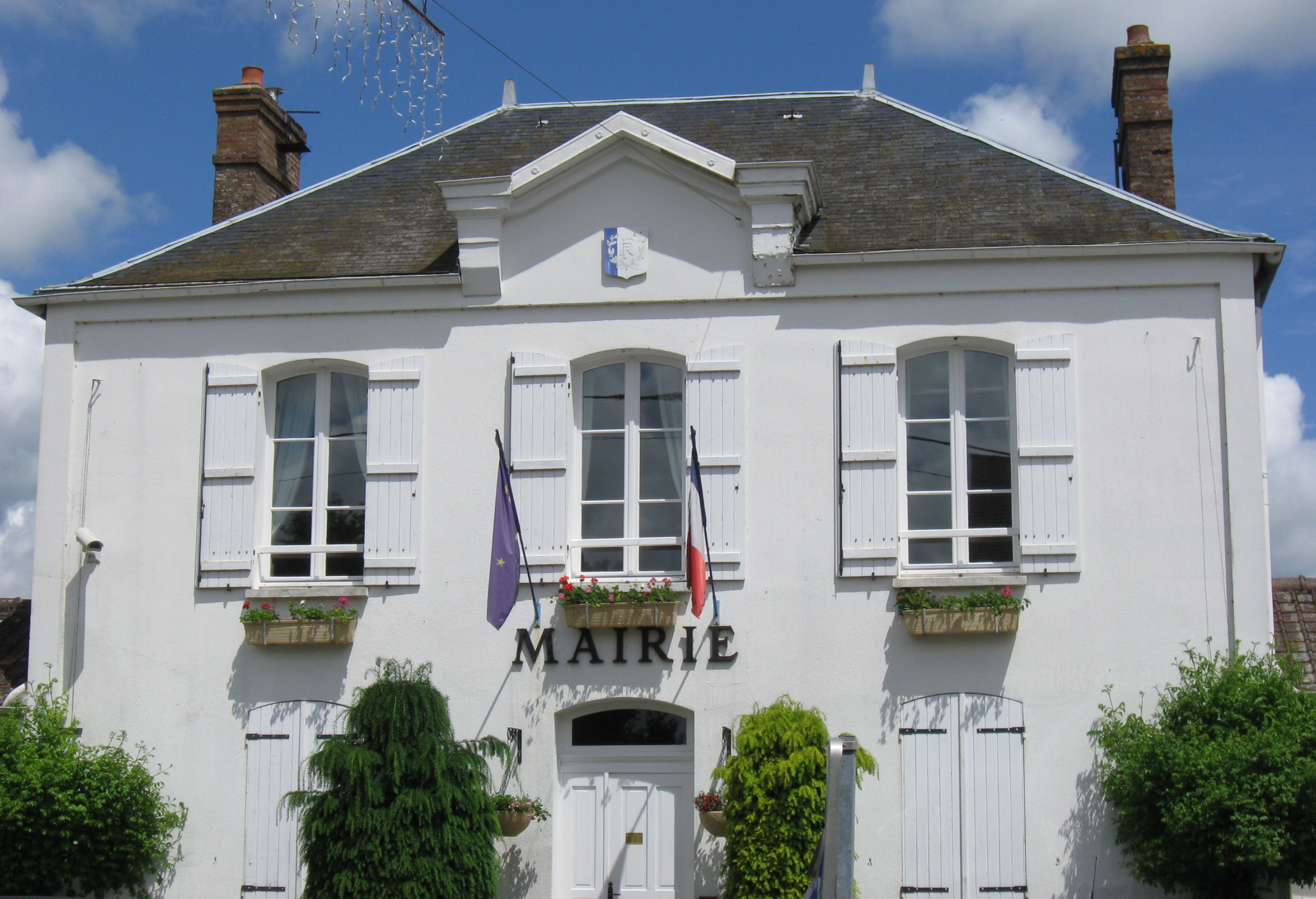 Mairie de Chevru. (Seine-et-Marne, région Île-de-France).